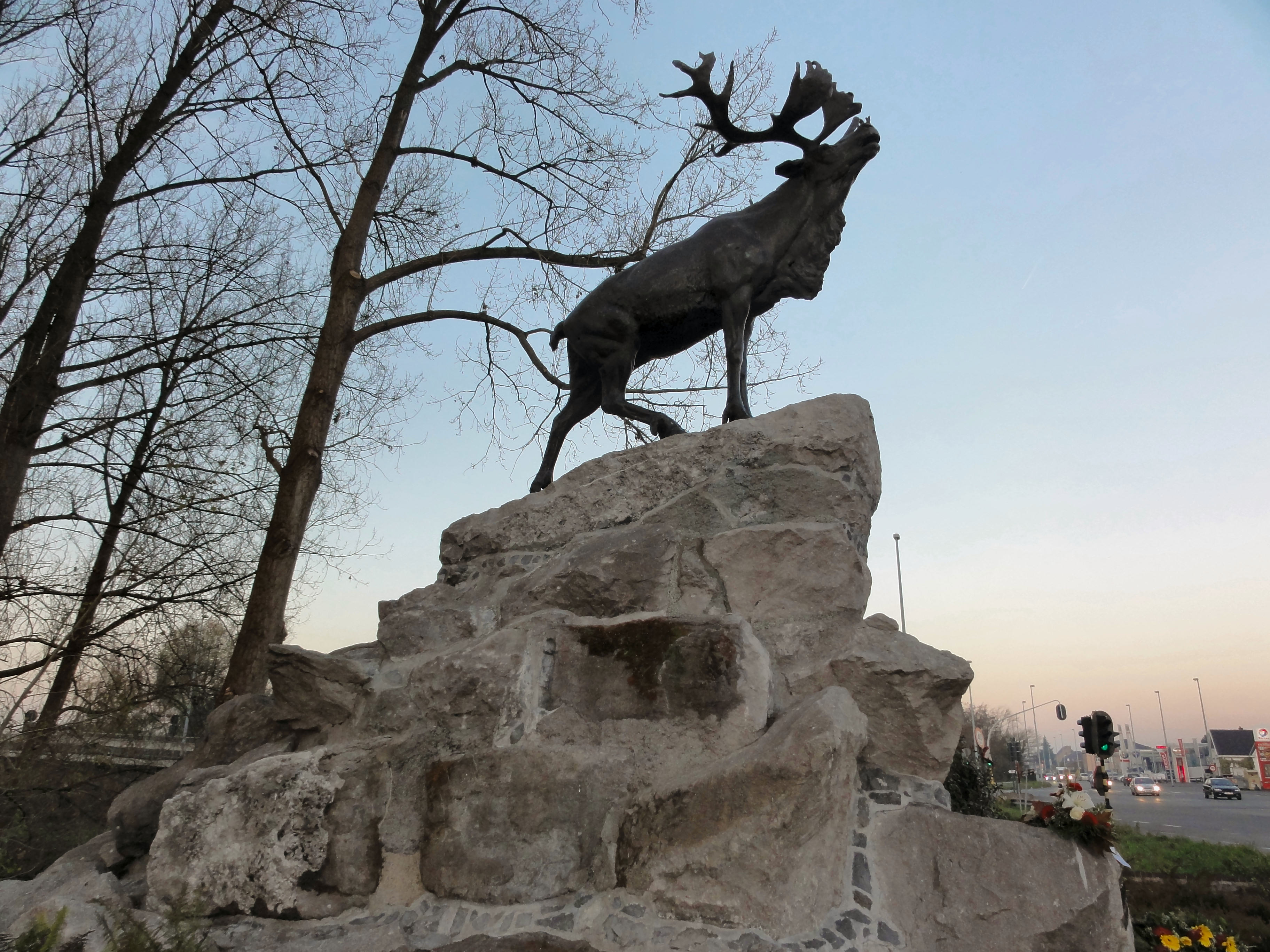 Courtrai Newfoundland Memorial in Kortrijk. Courtrai Newfoundland Memorial in Kortrijk. Kortrijk, West Flanders, Belgium